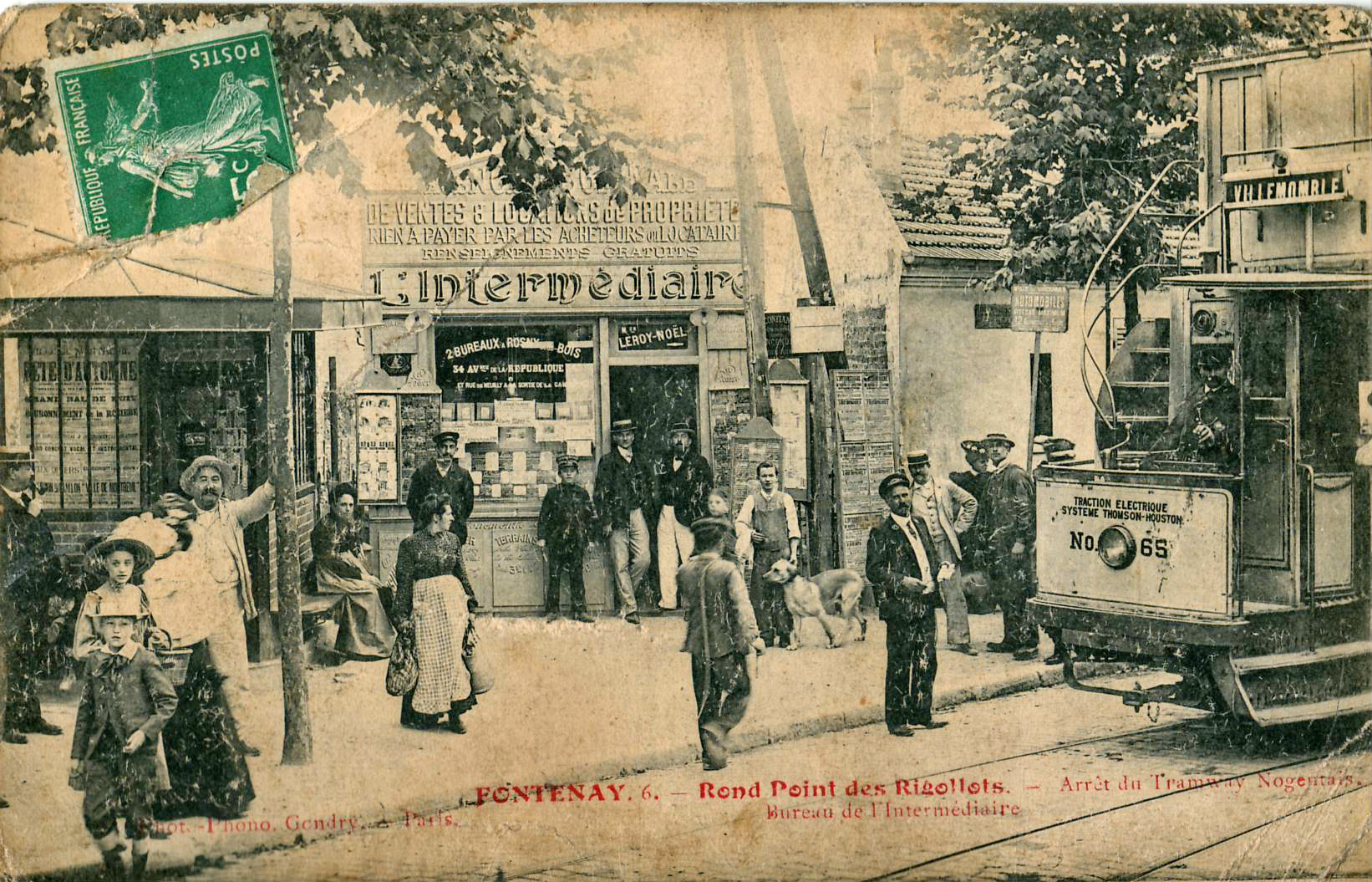 Carte postale ancienne éditée par Phot.-Phono Gendre à Paris, n°6FONTENAY - Rond-point des Rigollots - Arrêt du Tramway Nogentais - Bureau de l'Intermédiaire (agence immobilière)